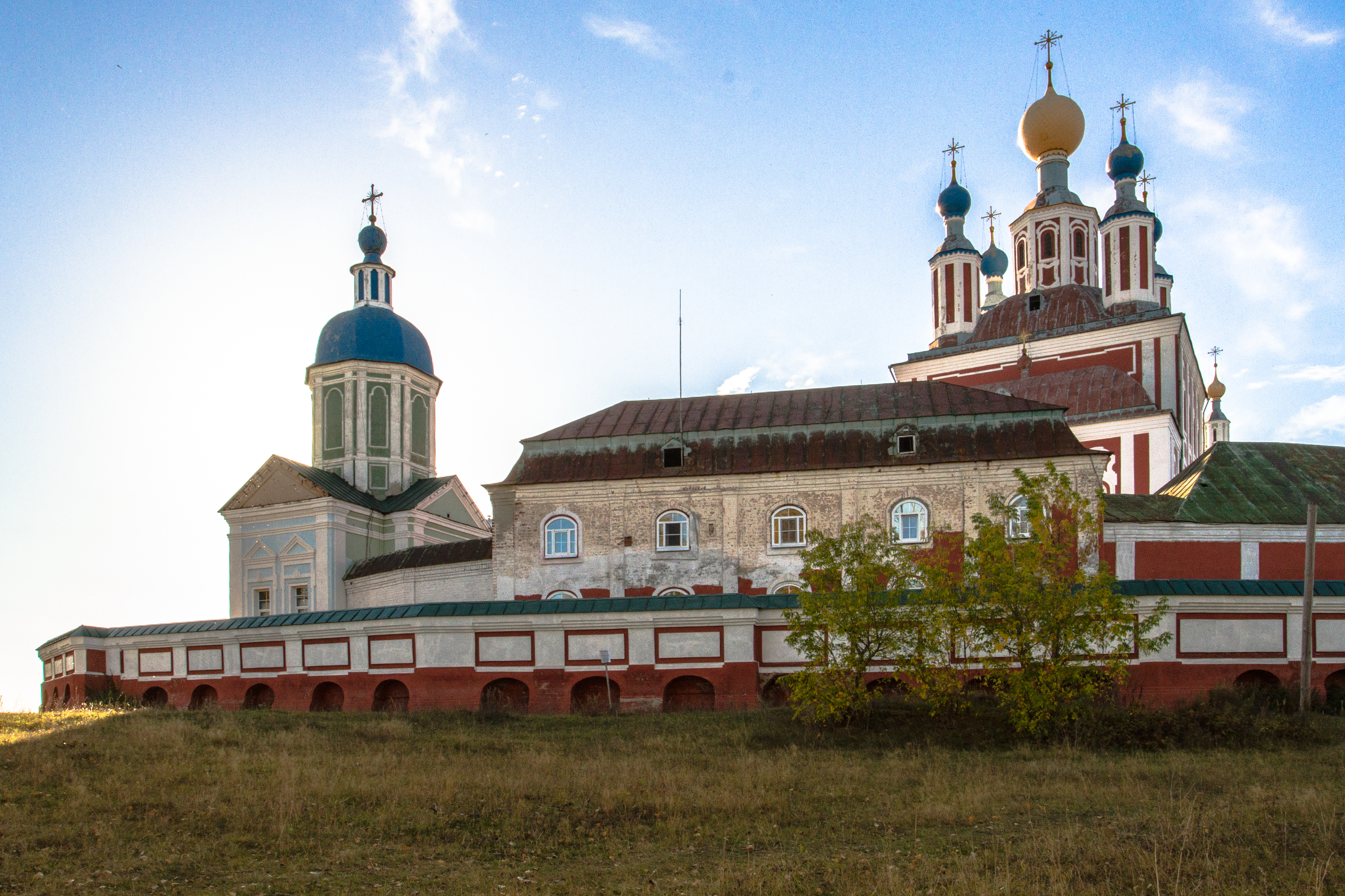 Монастырь Темниковский Санаксарский: Санаксарь, Темниковский район, Мордовия